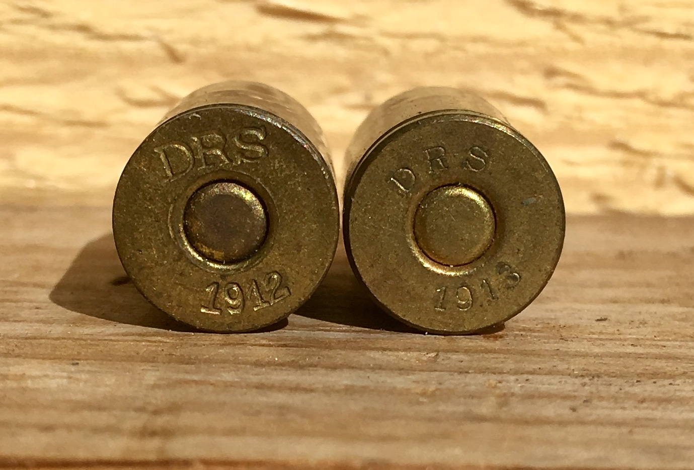 Маркировка гильз патронов датского выпуска к 11,35-мм пистолету Шобо.